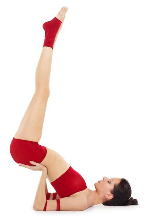 Viparita Karani by Nina Mel, Yoga Teacher